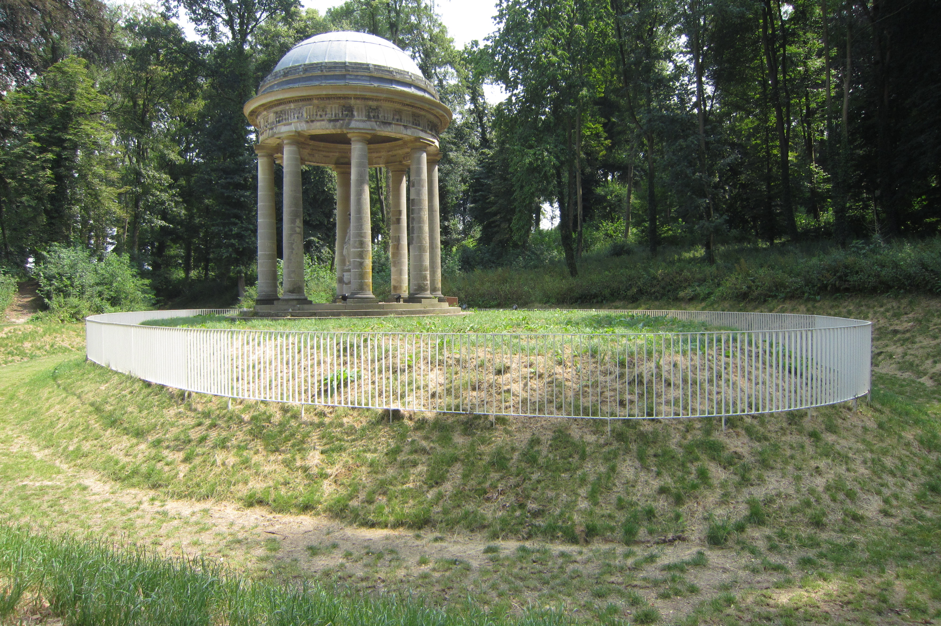 Aanleg Engelse Tuin Alden Biesen rond Minvervatempel, 2018